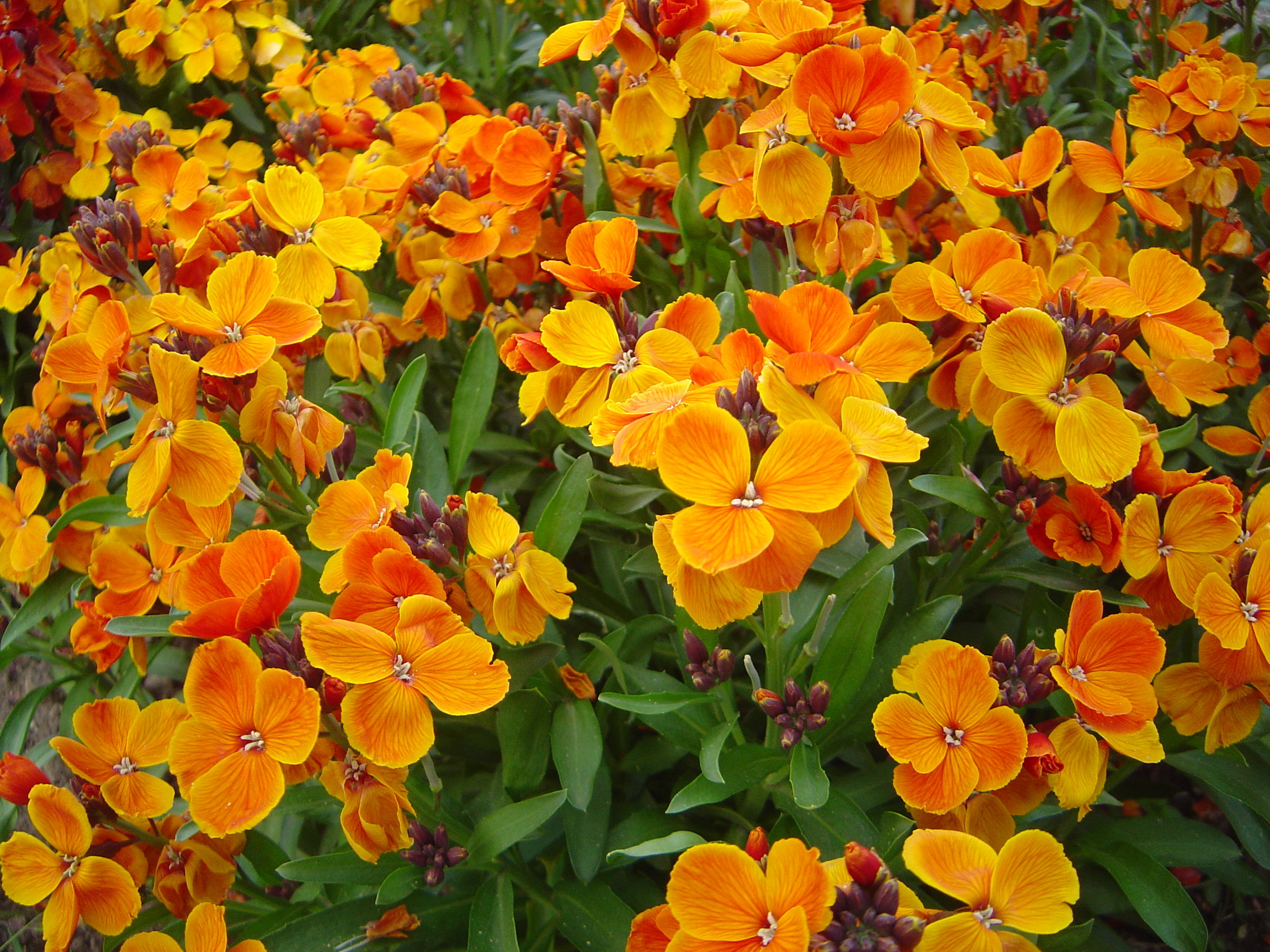 Cheiranthus cheiri L. 'orange bedder' En: Photograph taken at the Jardin des Plantes in Paris, France Fr: Photographie prise au Jardin des Plantes à Paris, France